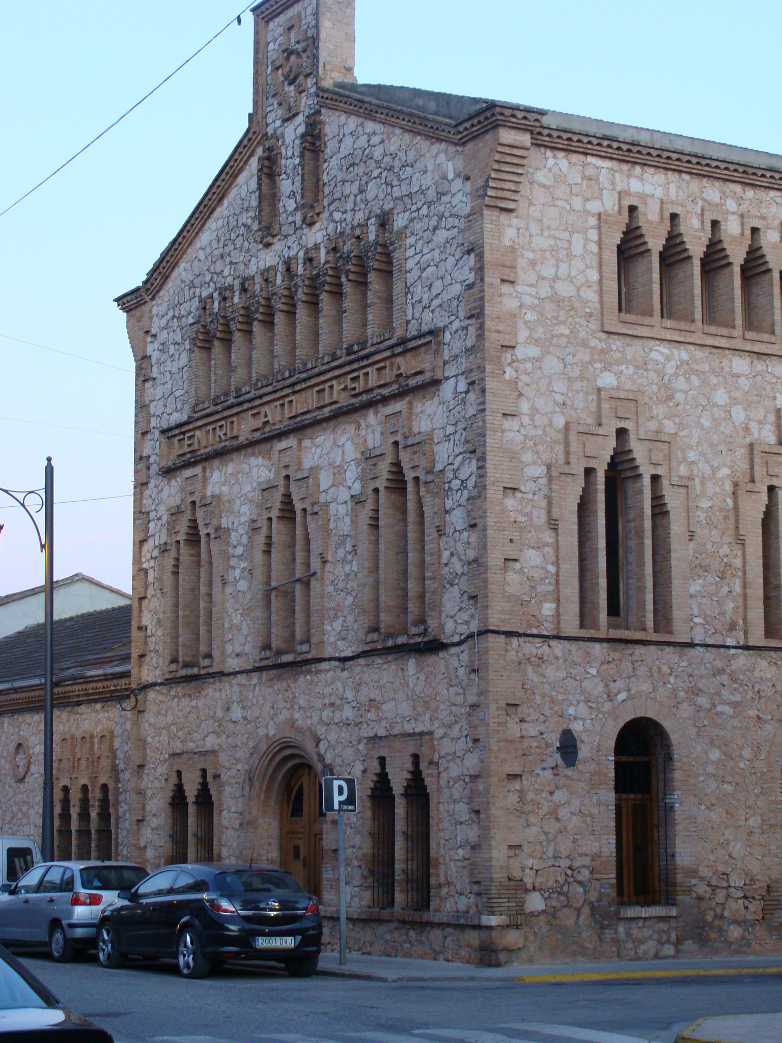 El Centro Católico Social de Catadau es un hermoso edificio civil construido en 1914